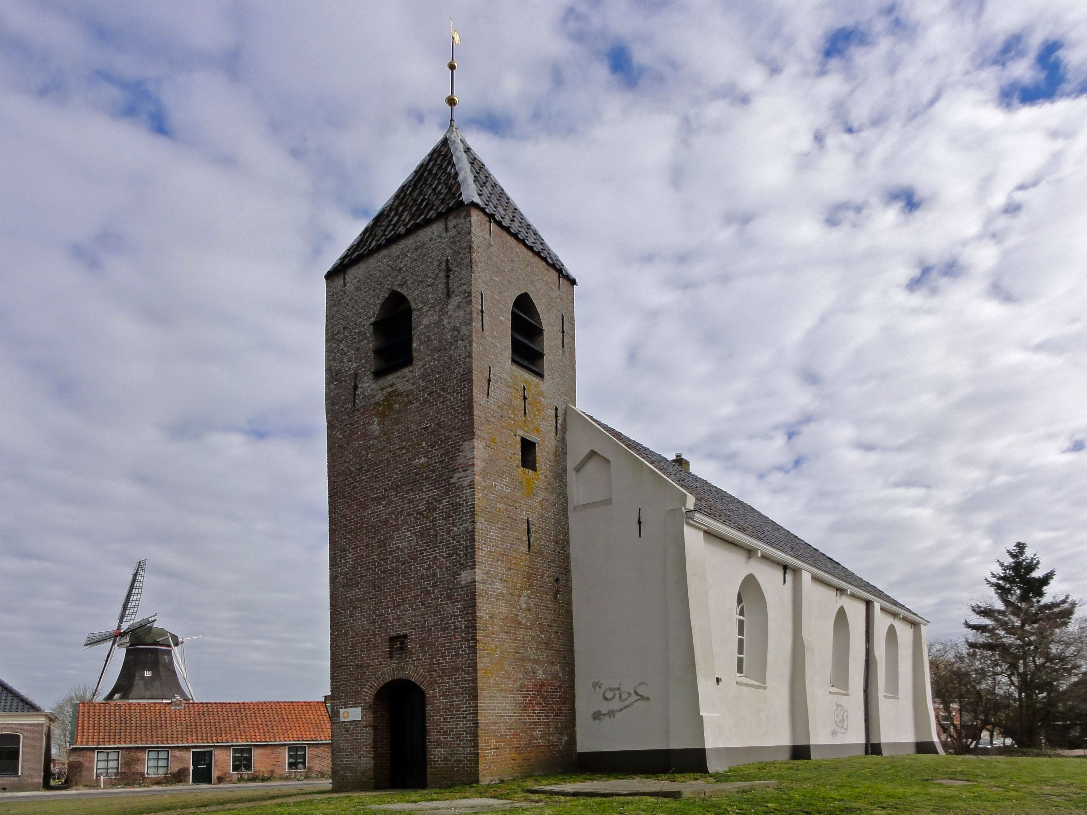 Kerk van Mensingeweer